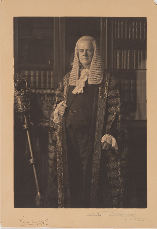 Robert Reid, 1st Earl Loreburn (1846-1923)